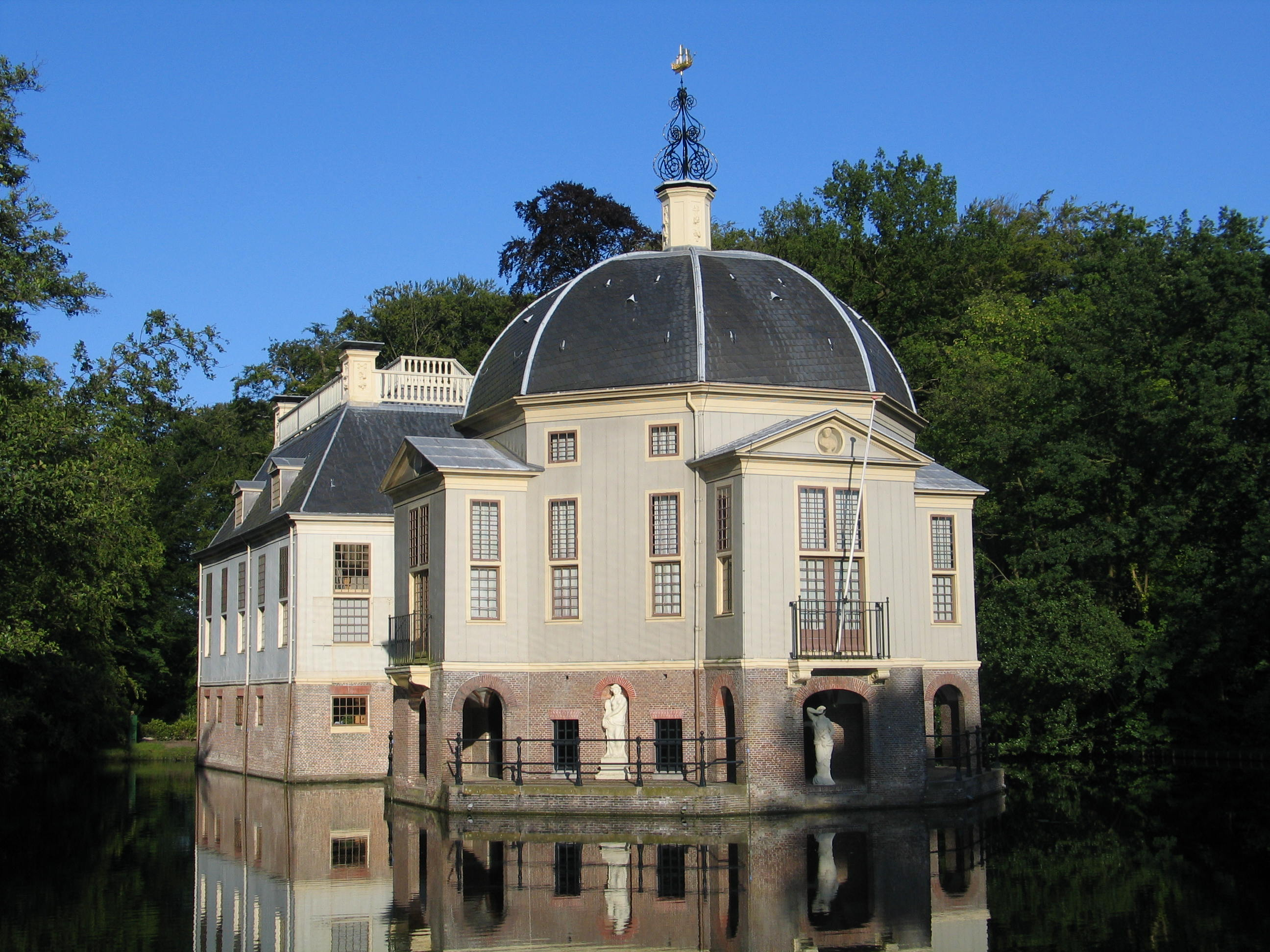 Huis De Trompenburgh is een buitenplaats in 's-Graveland, vermoedelijk gebouwd door Daniel Stalpaert voor admiraal Cornelis Tromp